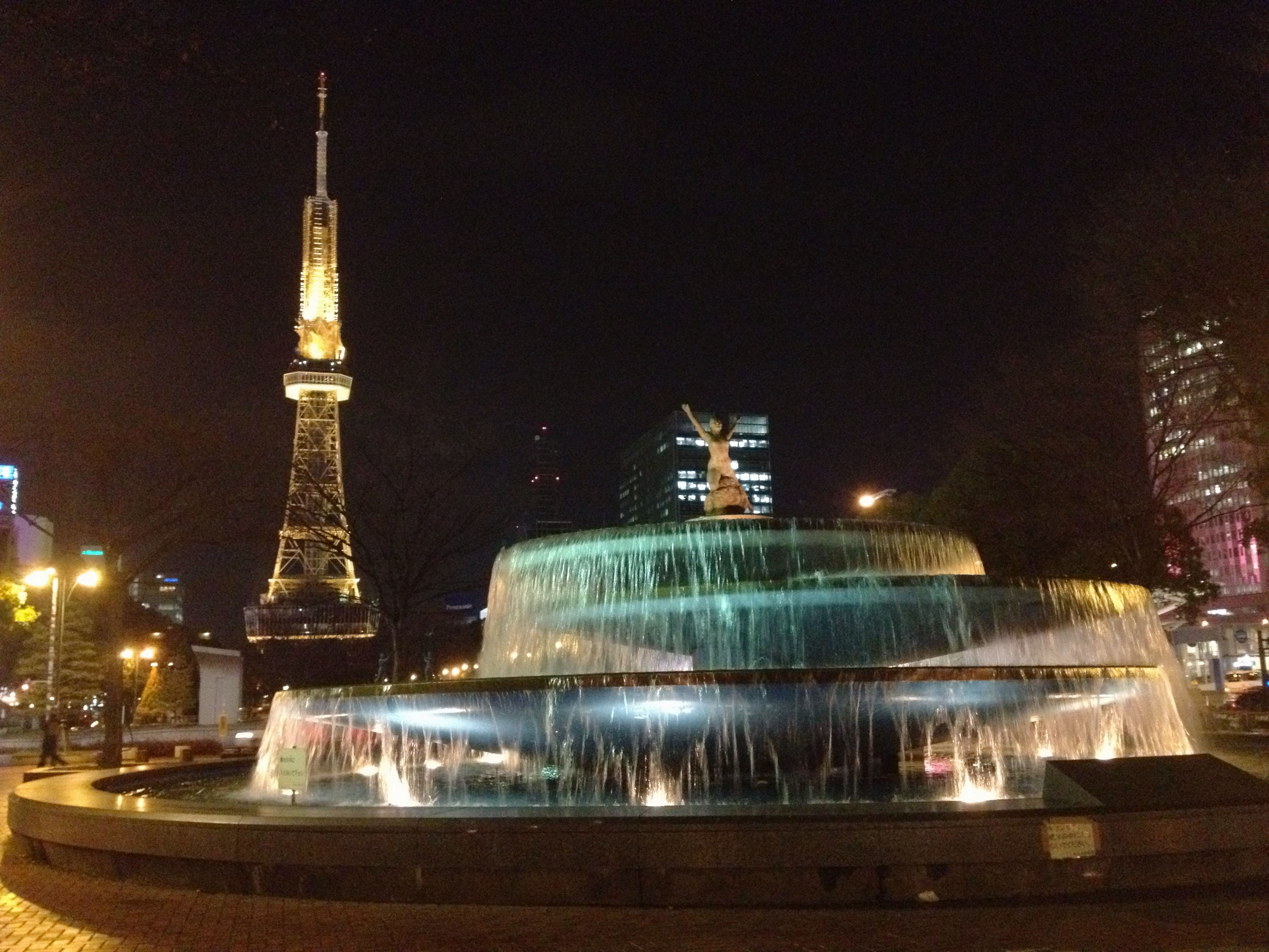 名古屋市中区の久屋大通公園希望の泉（噴水）。夜に撮影。後ろに見えるのは名古屋テレビ塔。